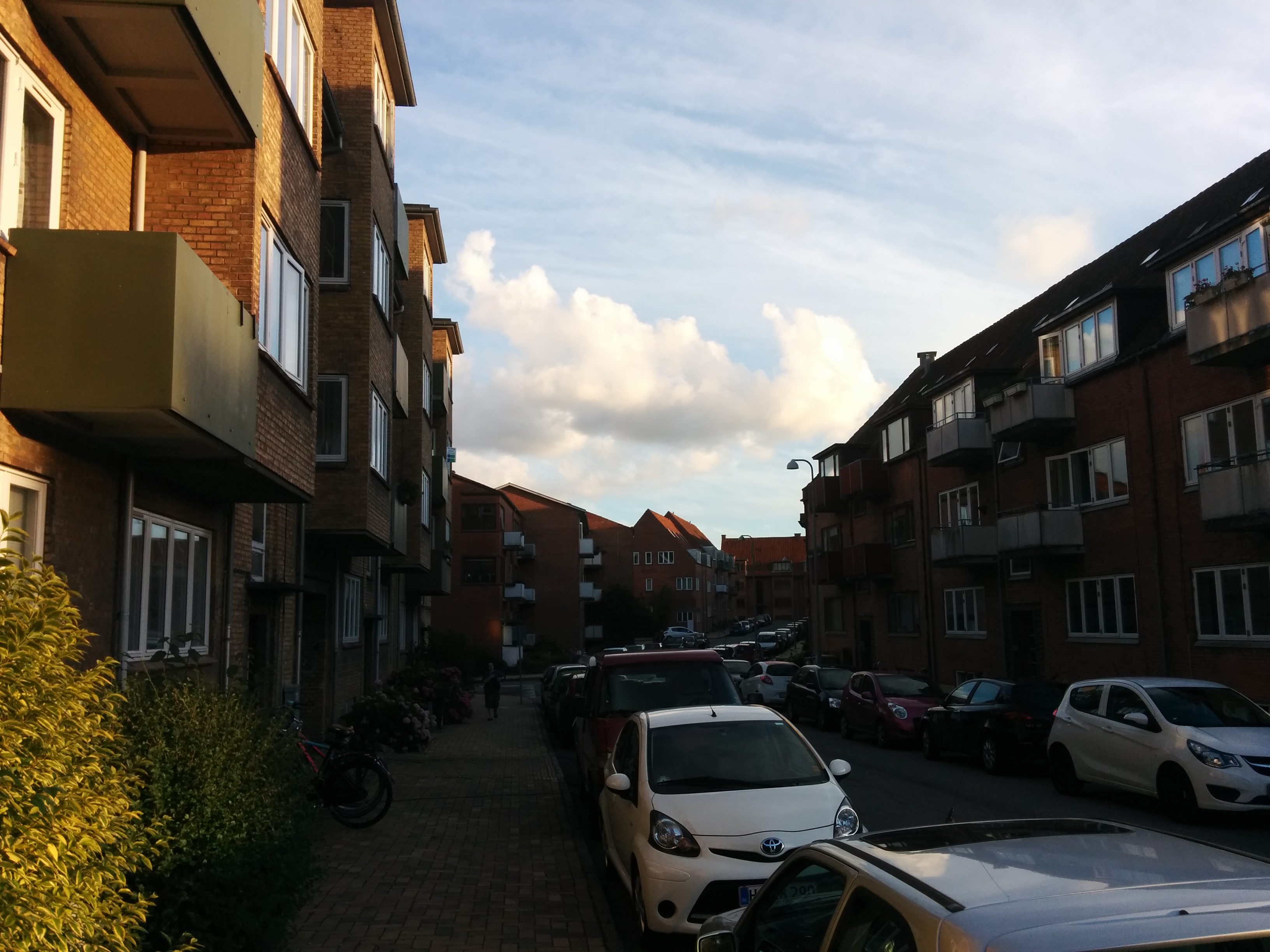 Gyldenløvesgade juli 2016